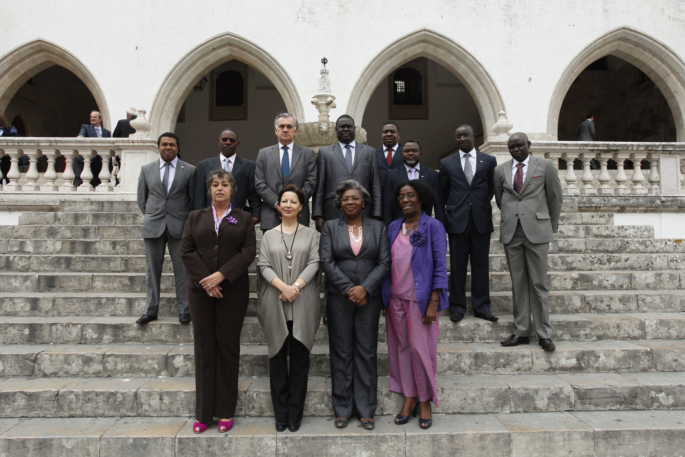 Foto Oficial dos Ministros na VII Reunião de Ministros da Cultura da CPLP, Sintra - Portugal 18 de Junho de 2010. (Crédito: Marcos Borga)